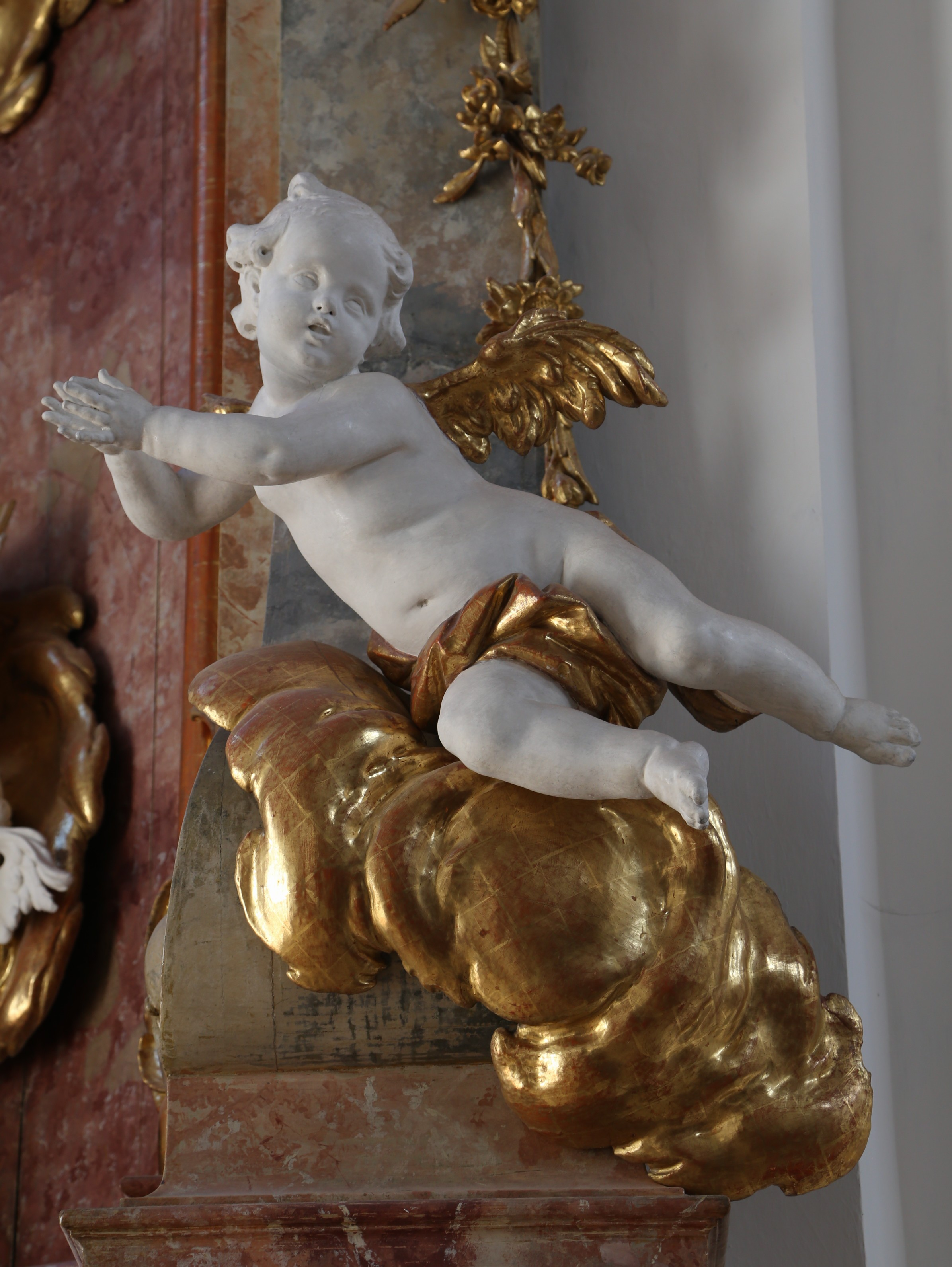 Putto, Klosterkirche St. Dionysius und Juliana, Kloster Schäftlarn